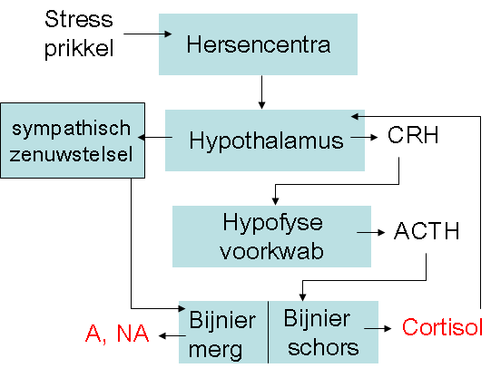 Stresssysteem